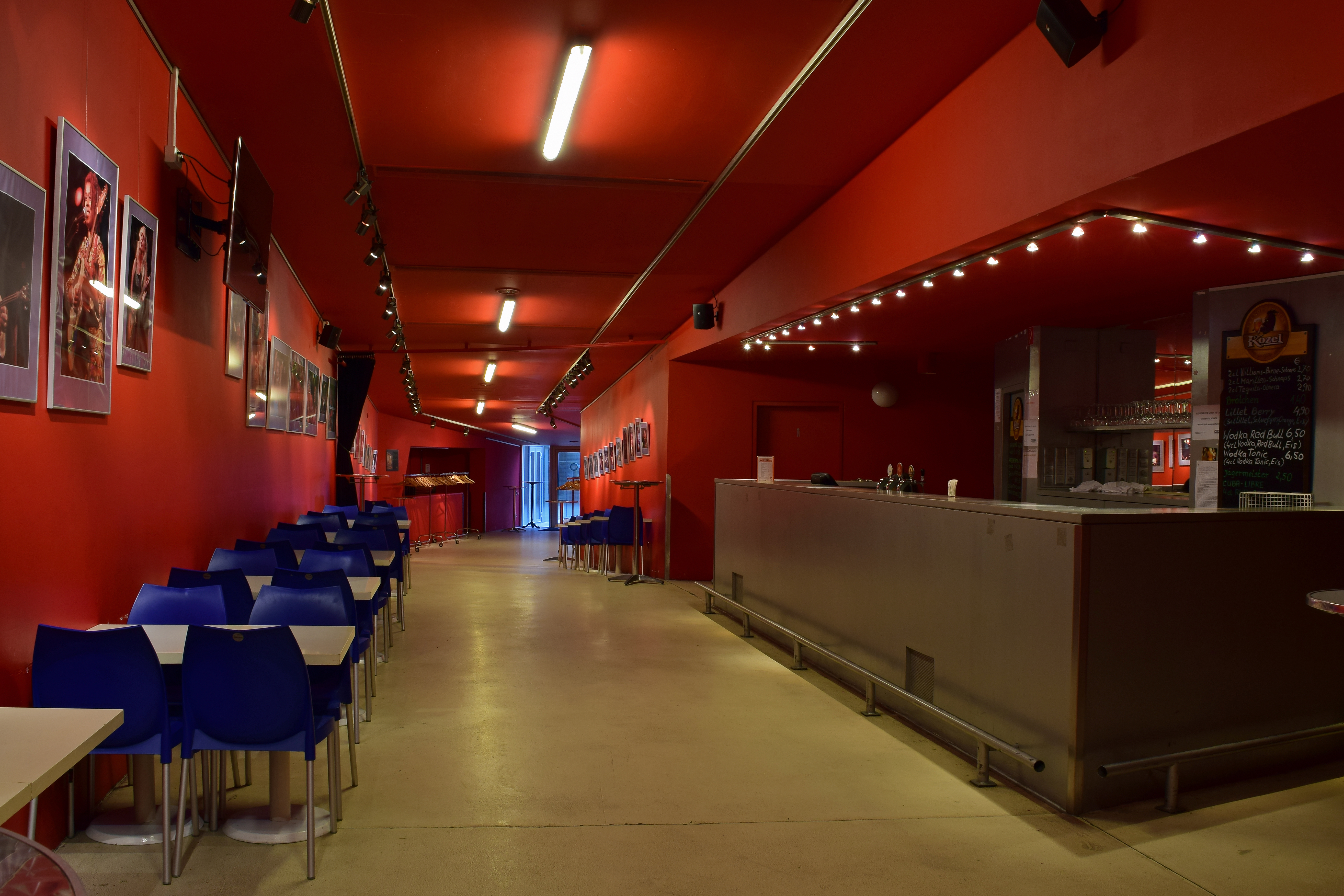 Foyer des Veranstaltungssaals mit Bar in der Sargfabrik